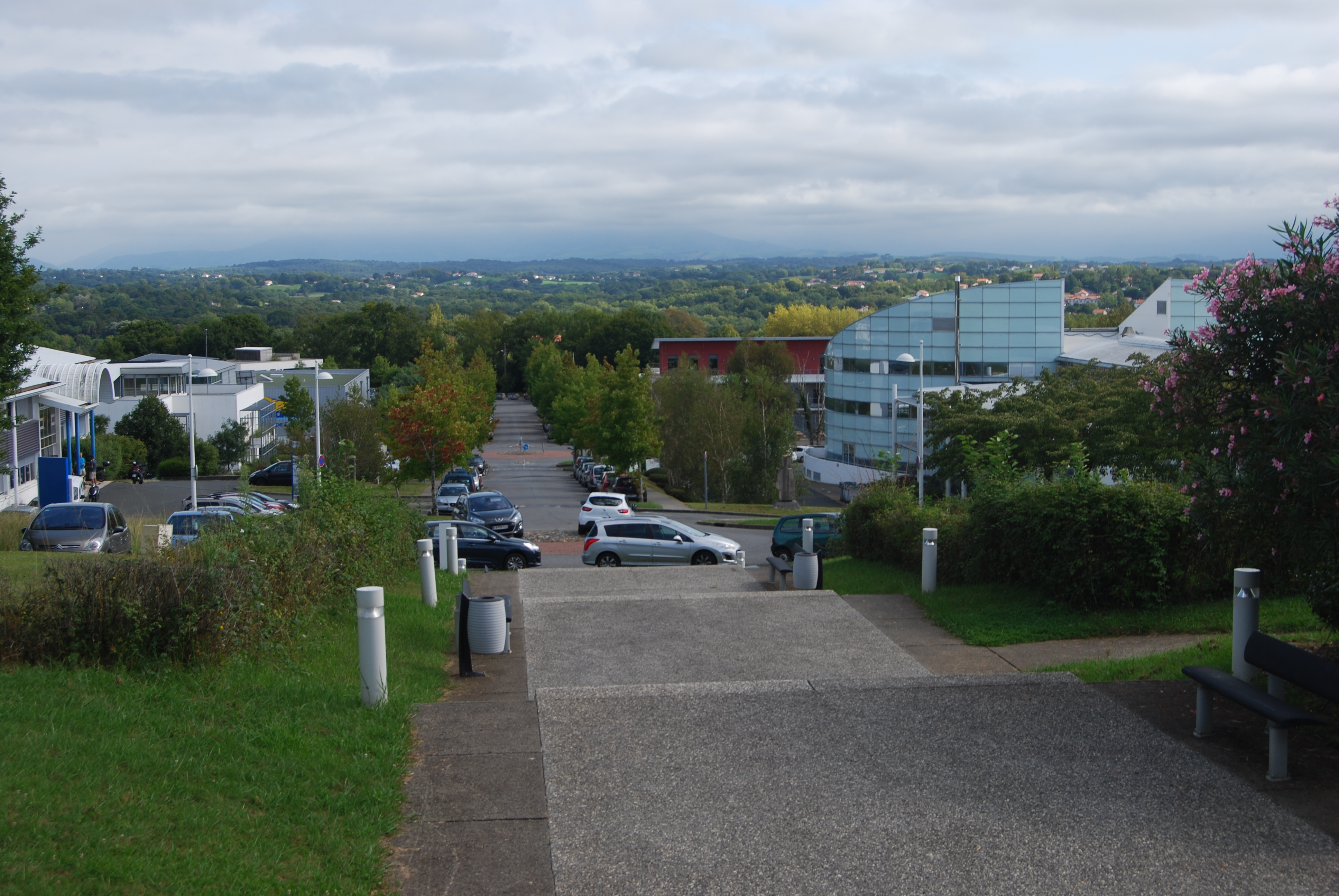 Technopôle Izarbel à Bidart vu depuis ses hauteurs à l'été 2014.